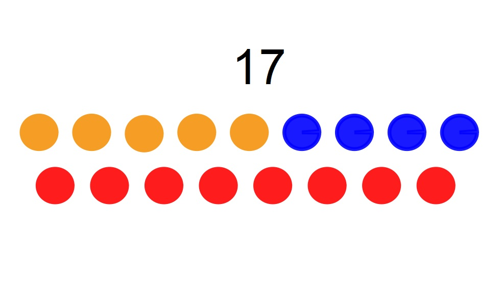 Número de concejales de Villafranca de los Barros